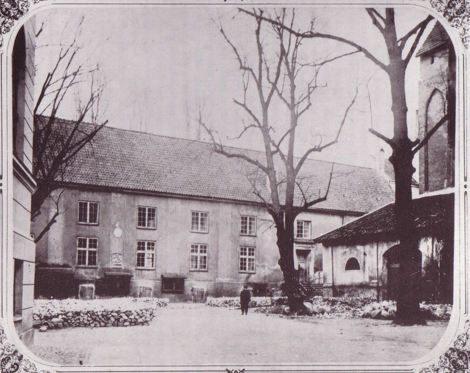 Fotografie des alten Universitätsgebäudes (Collegium Albertinum) und der originalen Stoa Kantiana